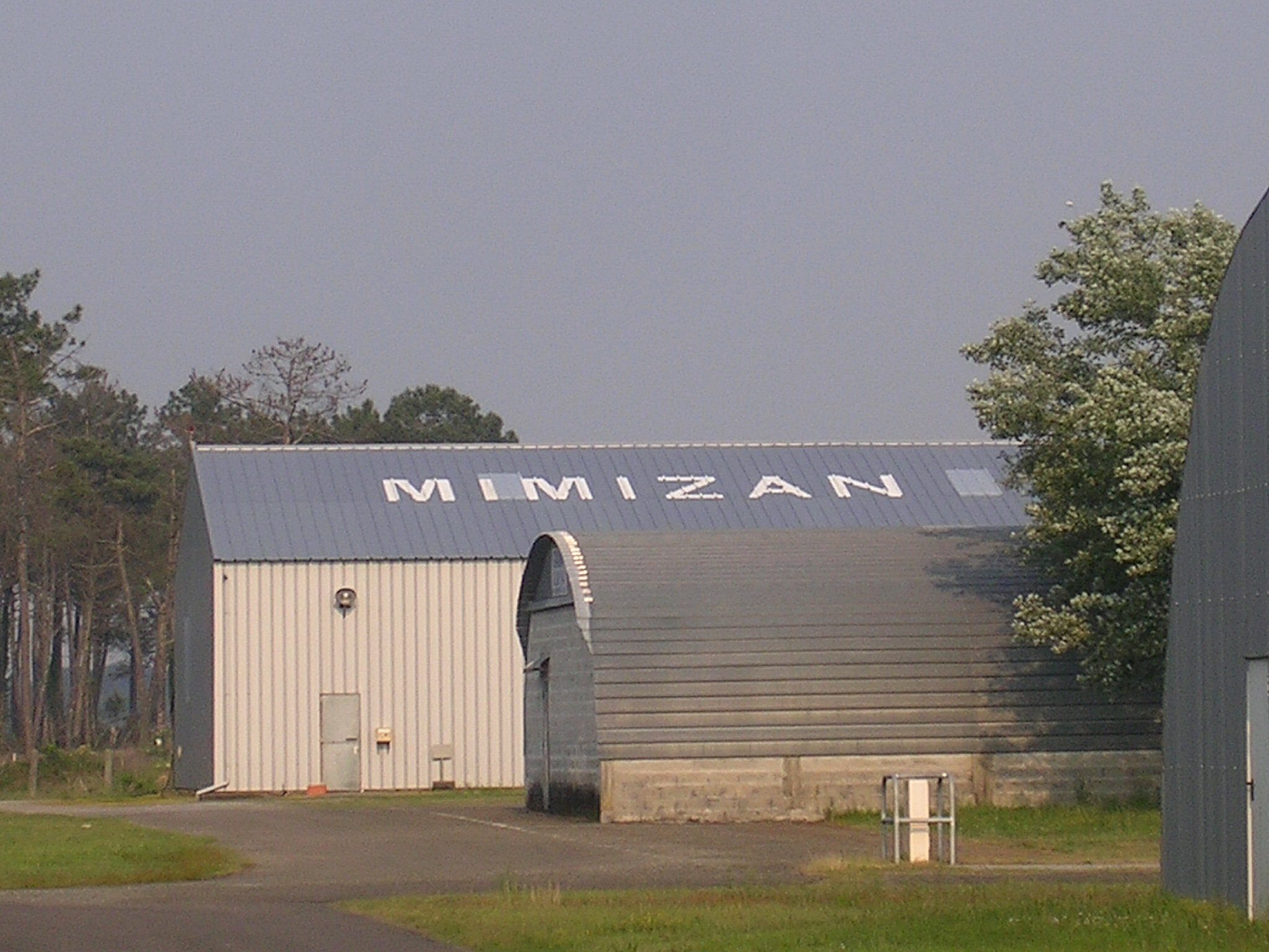 Aérodrome de Mimizan, dans le département français des Landes